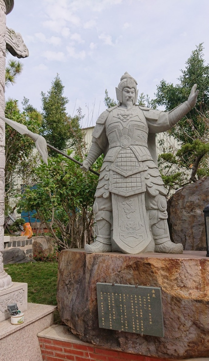 The statue of Yue Fei in chifa-mazu temple.